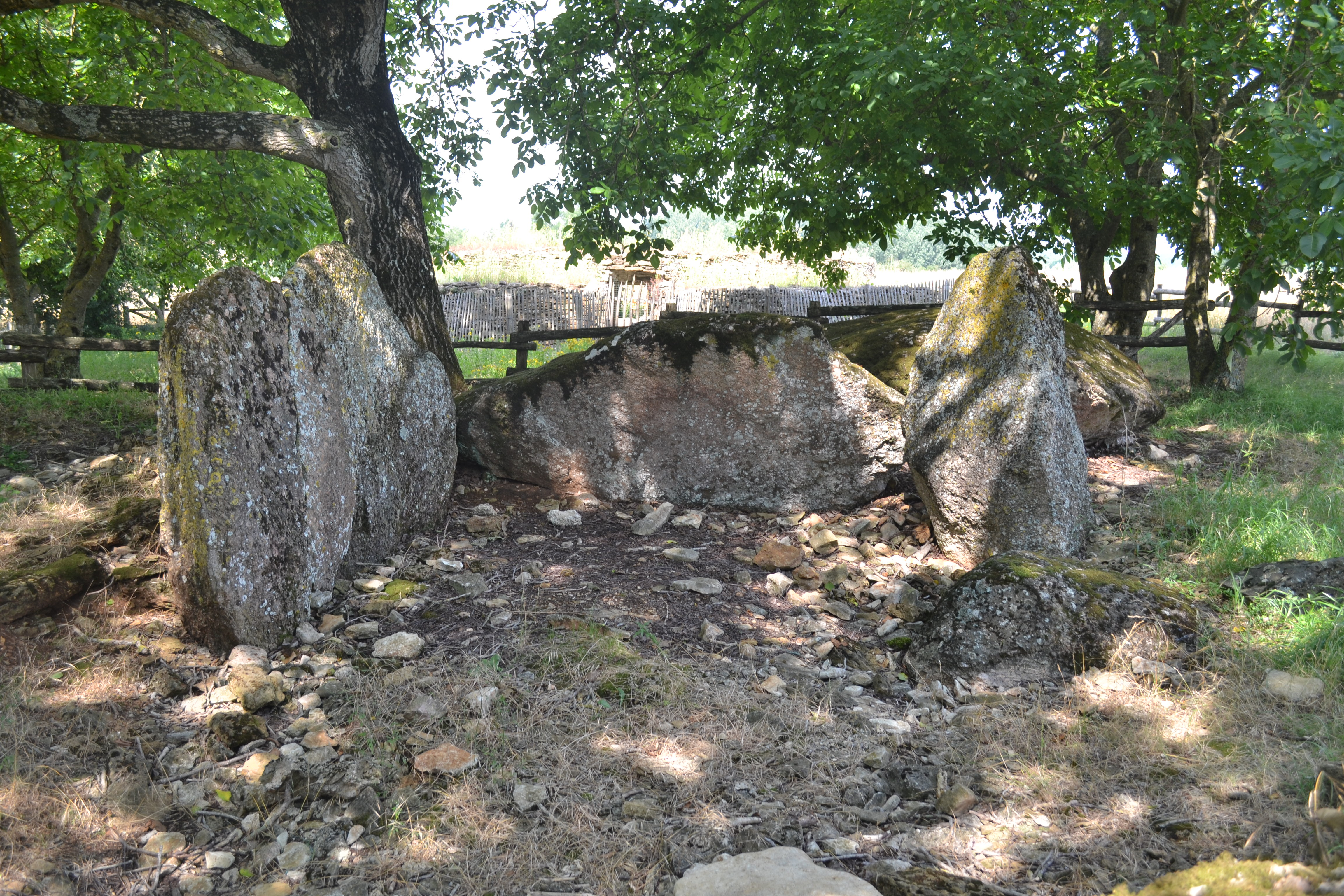 Dolmen des Pierres-Folles à Bazoges-en-Pareds (85).